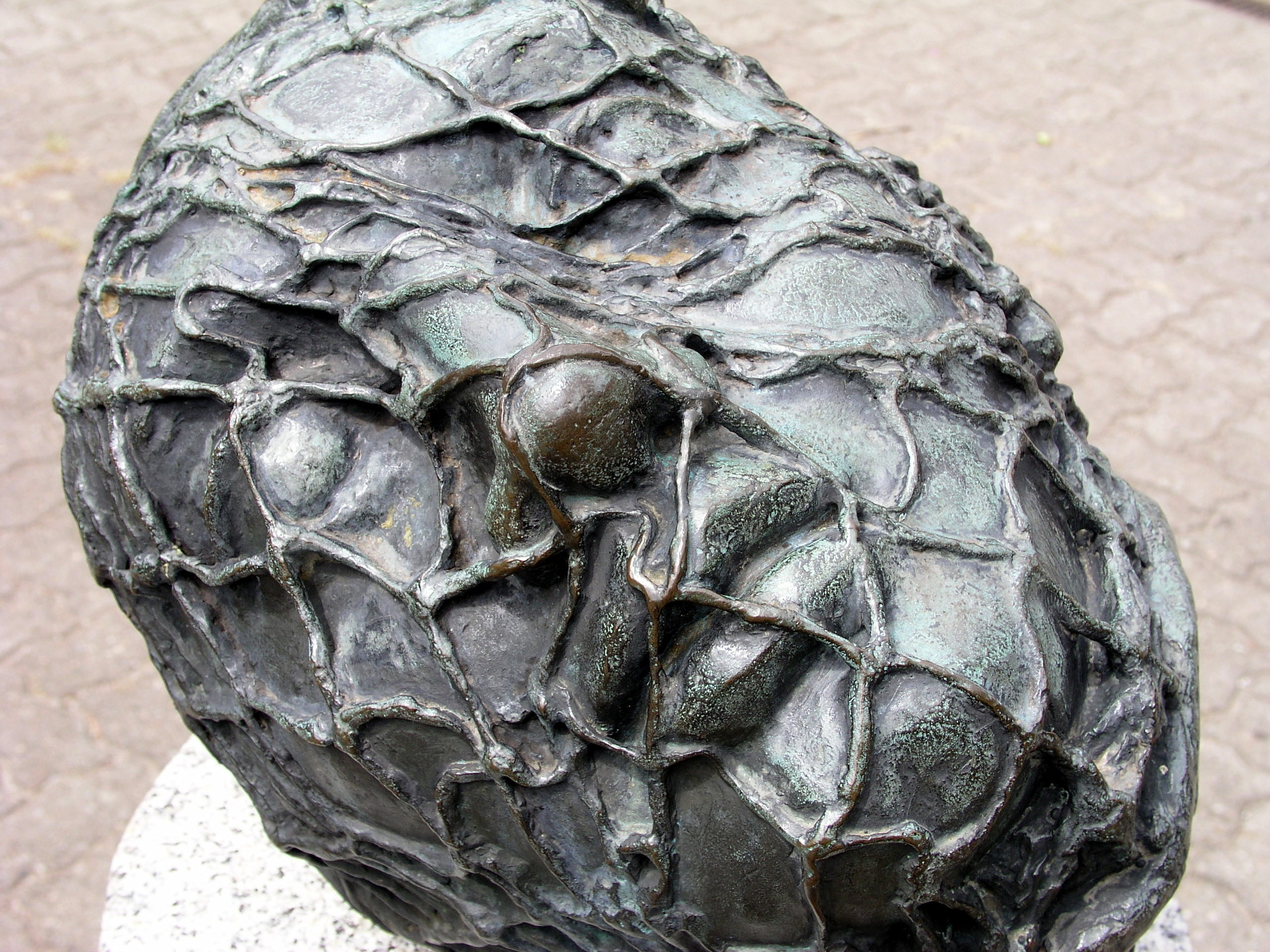 "Voilá l´homme" oder: "Kopf im Netz", 1971, Bronzeskulptur von Maria Pirwitz, Diese Skulptur befindet sich auf dem Skulpturenhof in Hamburg Mümmelmannsberg